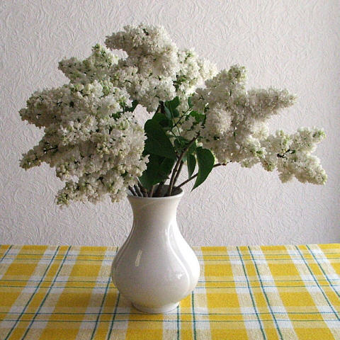 Weißer Flieder (Syringa)